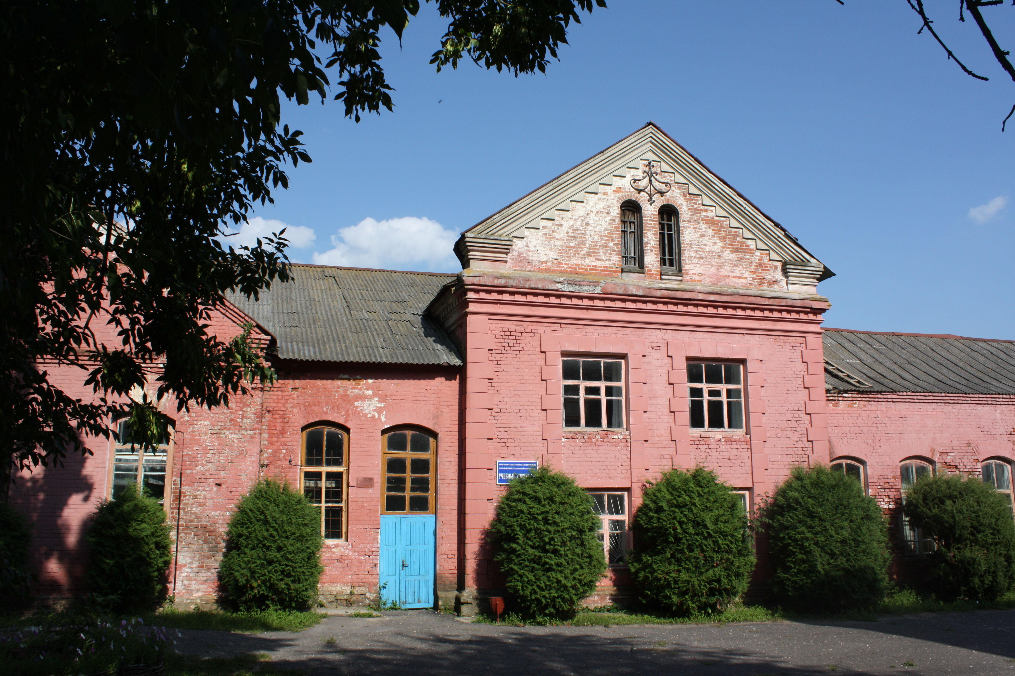 Беларуская (тарашкевіца): Палацава-паркавы комплекс Козелаў-Паклеўскіх. в. Красны Бераг This is a photo of Belarusian heritage monument. Reference number: 312Г000324 ( WLM)